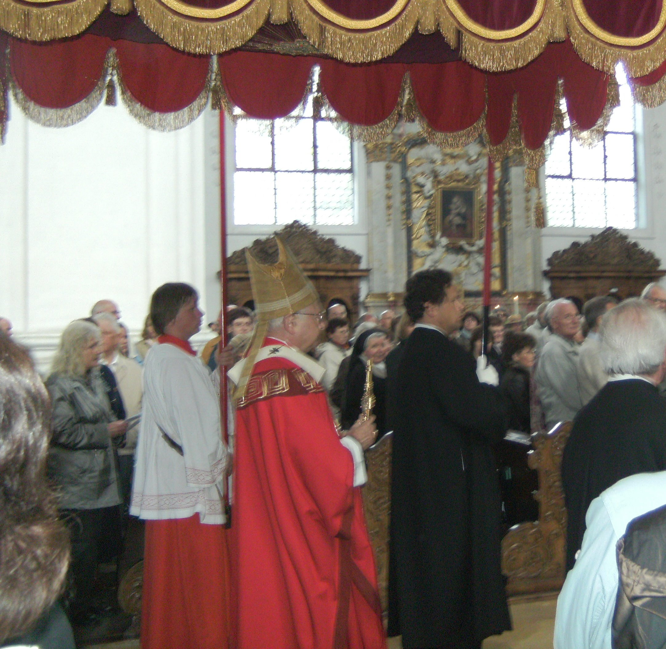 Erzbischof Robert Zollitsch beim Pontifikalamt in der Basilika Weingarten anlässlich des Blutritts, der größten Reiterprozession der Welt, in Weingarten 2008. In seiner Hand die Heilig-Blut-Reliquie.